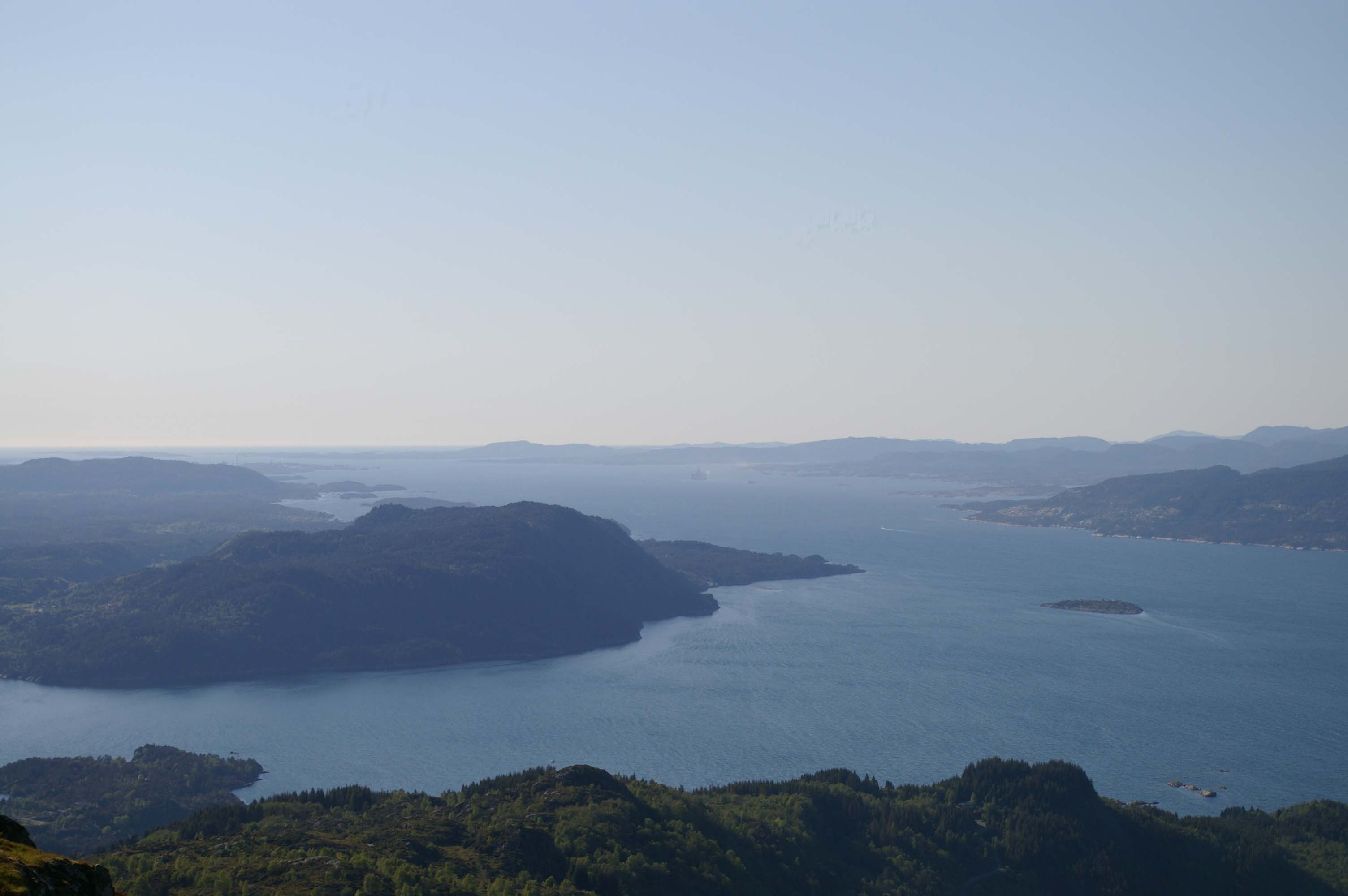 Fensfjorden (far) and Austfjorden (near) seen from Djupdalseggane, Lindås, Hordaland, Norway.